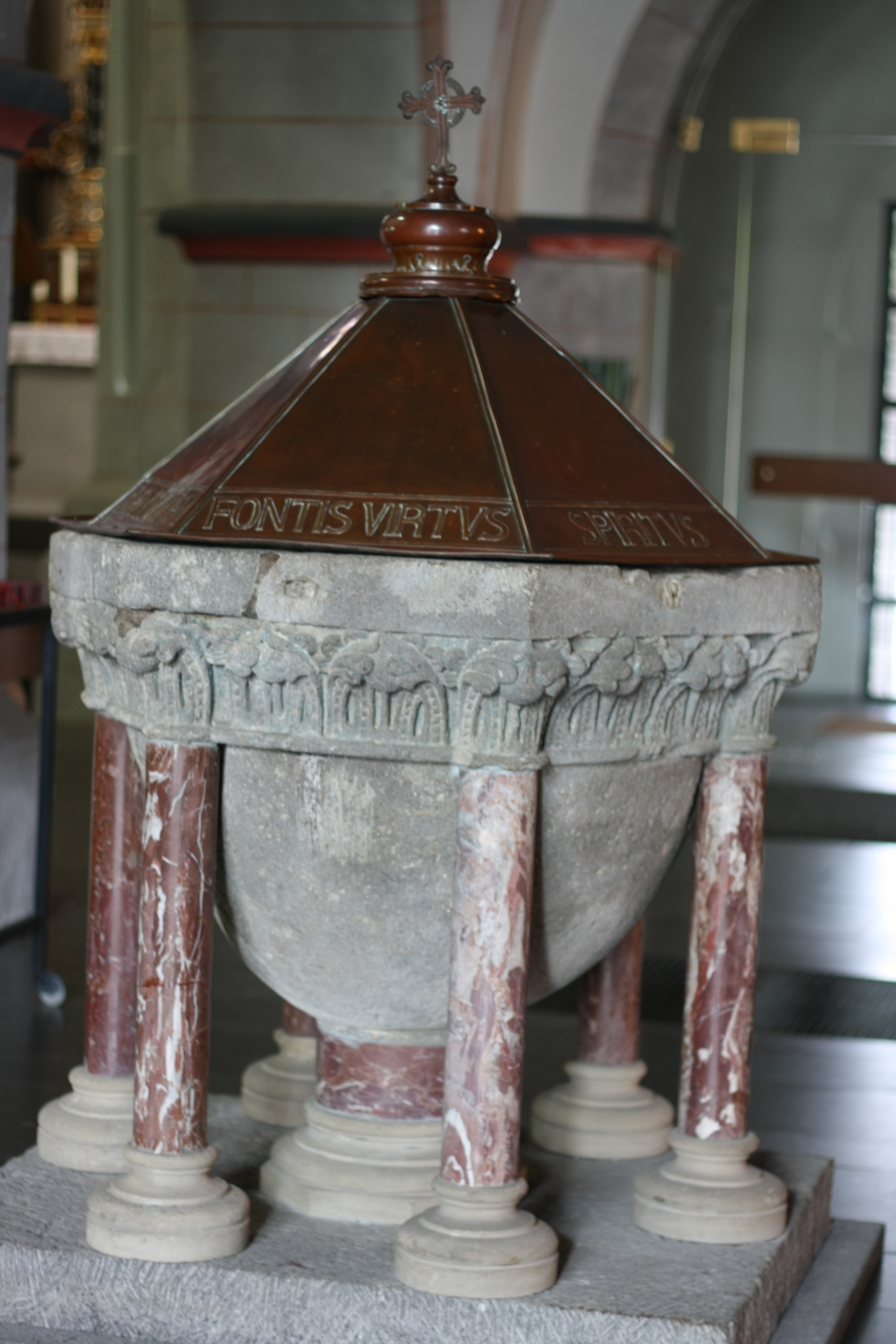 Romanisches Taufbecken (1230) in der katholischen Pfarrkirche St. Germanus in Niederzissen